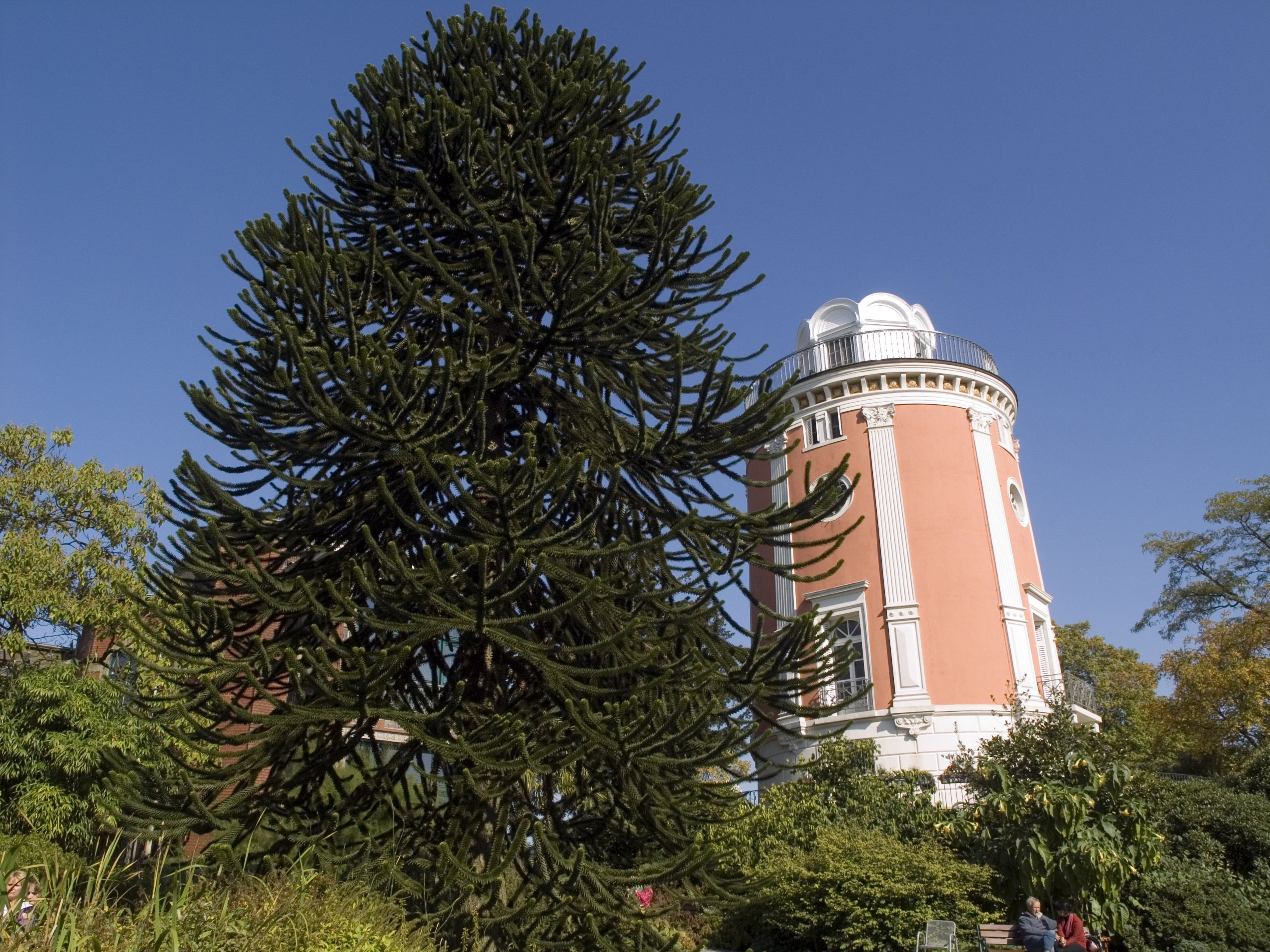 Башня Elisenturm (1838). Северный Рейн-Вестфалия, Вупперталь